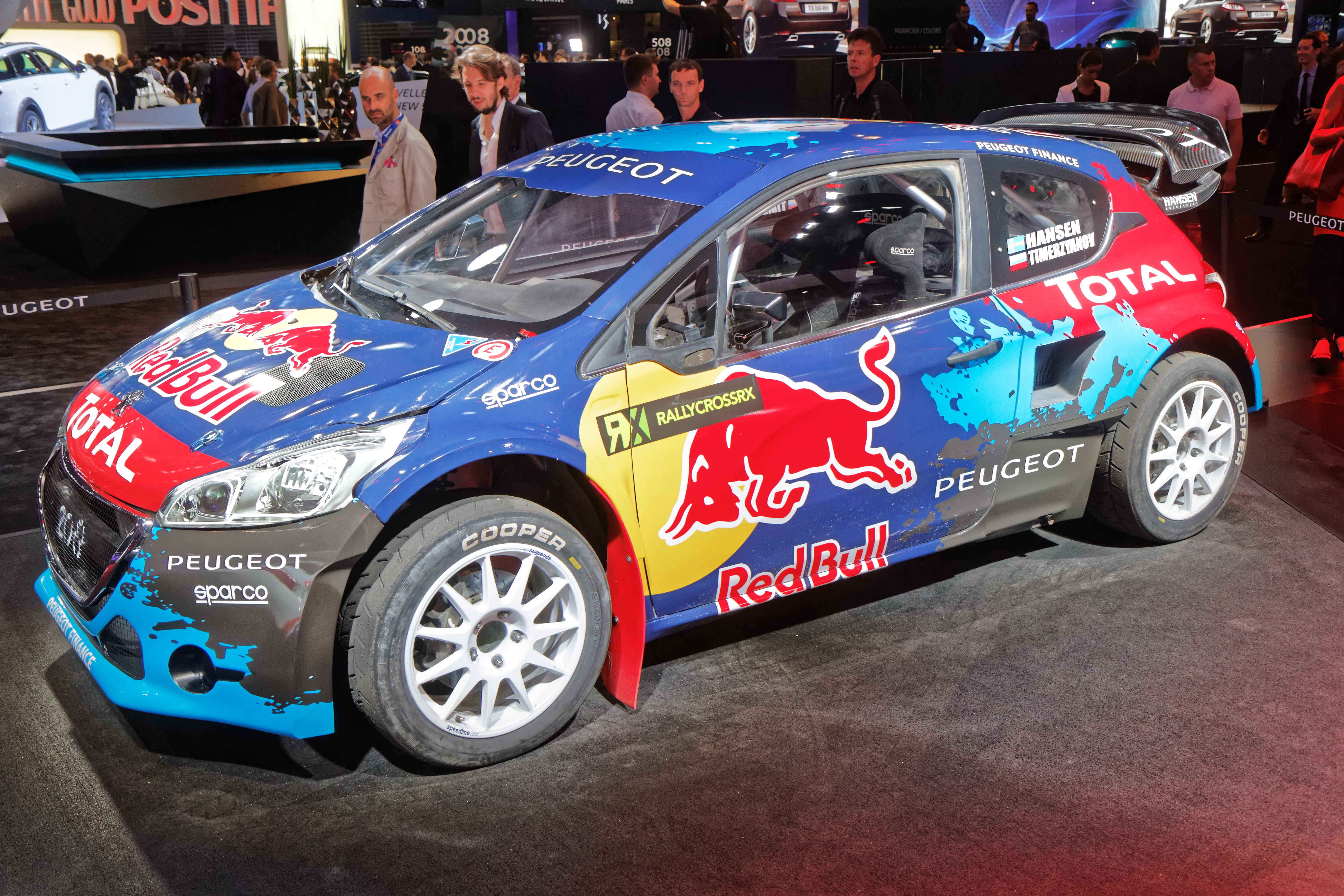 Une Peugeot 208 WRX présentée lors du mondial de l'automobile de Paris 2014.